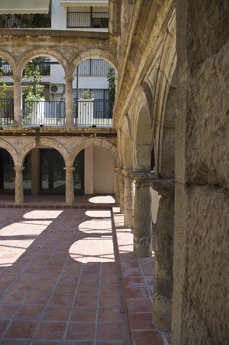 Antiguo claustro del Convento de Santo Domingo en Lorca (Murcia)